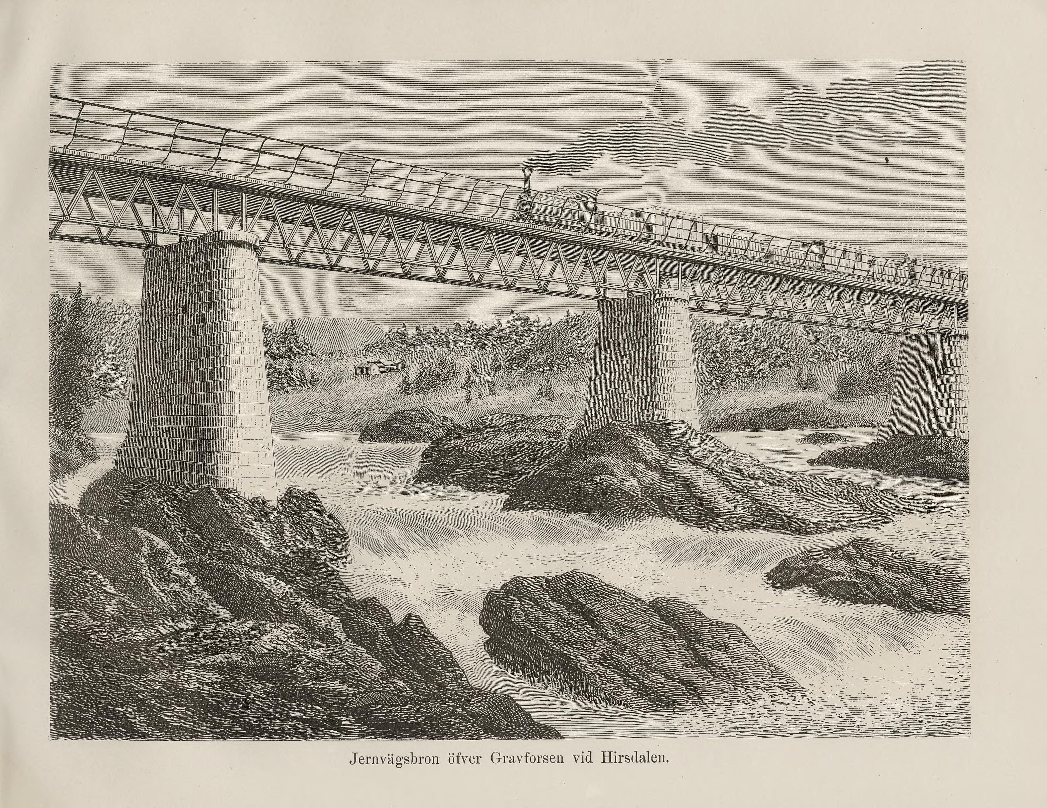 Illustrasjon hentet fra boken Nordiska taflor av ukjent forfatter og utgitt av Albert Bonnier (se, 1870)